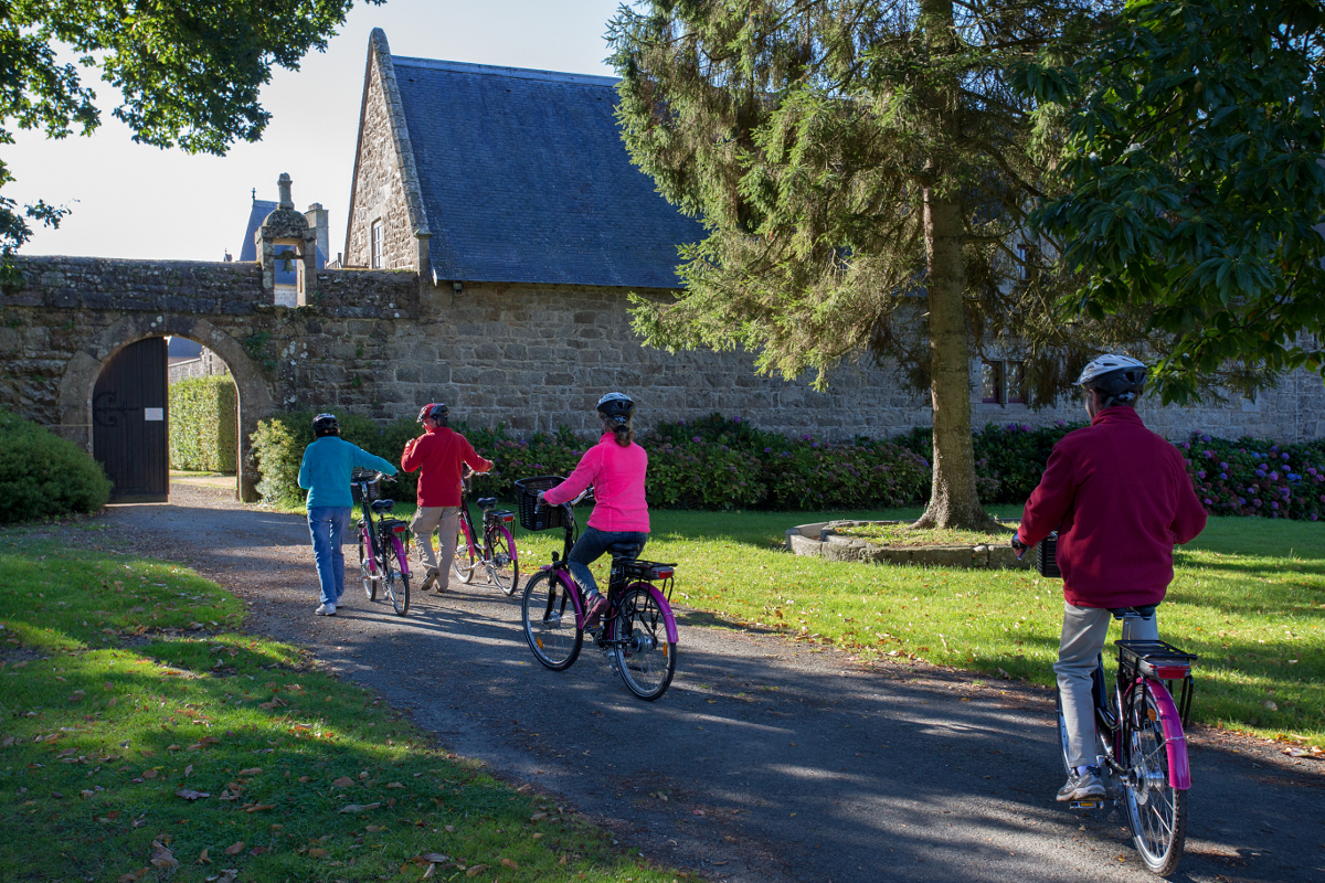 Vélek’tro, vélo à assistance électrique sur la Côte de Granit Rose en Bretagne. Entrée nord du château de Rosanbo en Lanvellec (22).